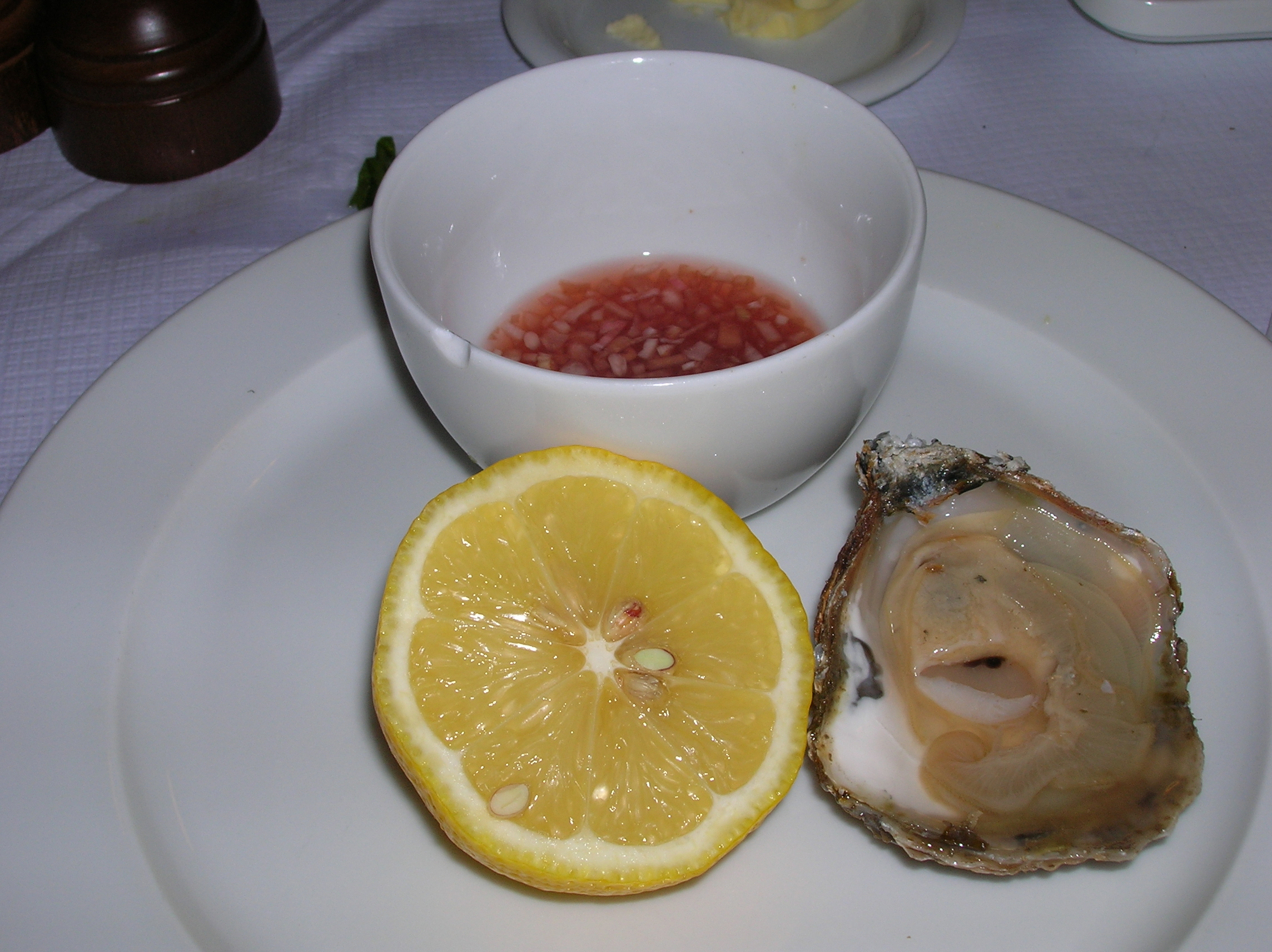 אויסטר מגלוצ'סטר, שאלוט ולימון, במסעדת סנט ג'והן, לונדון